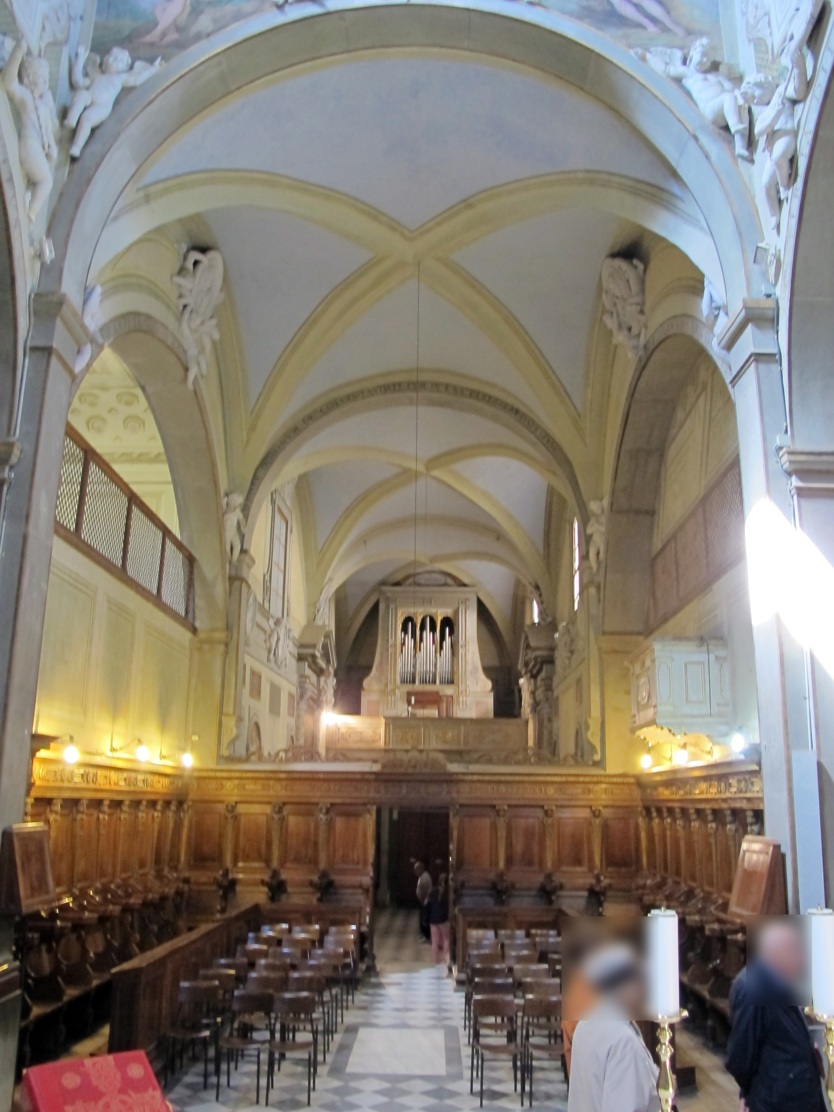 Abbazia di San Michele Arcangelo a Passignano